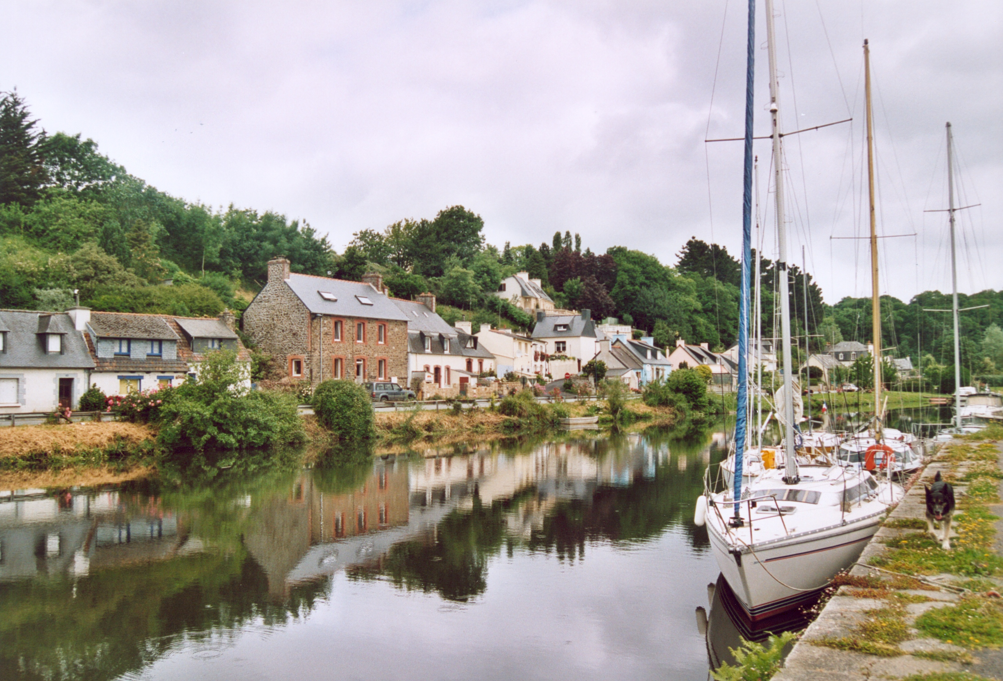 France Bretagne Côtes d'Armor Port à Pontrieux Photographie prise par GIRAUD Patrick